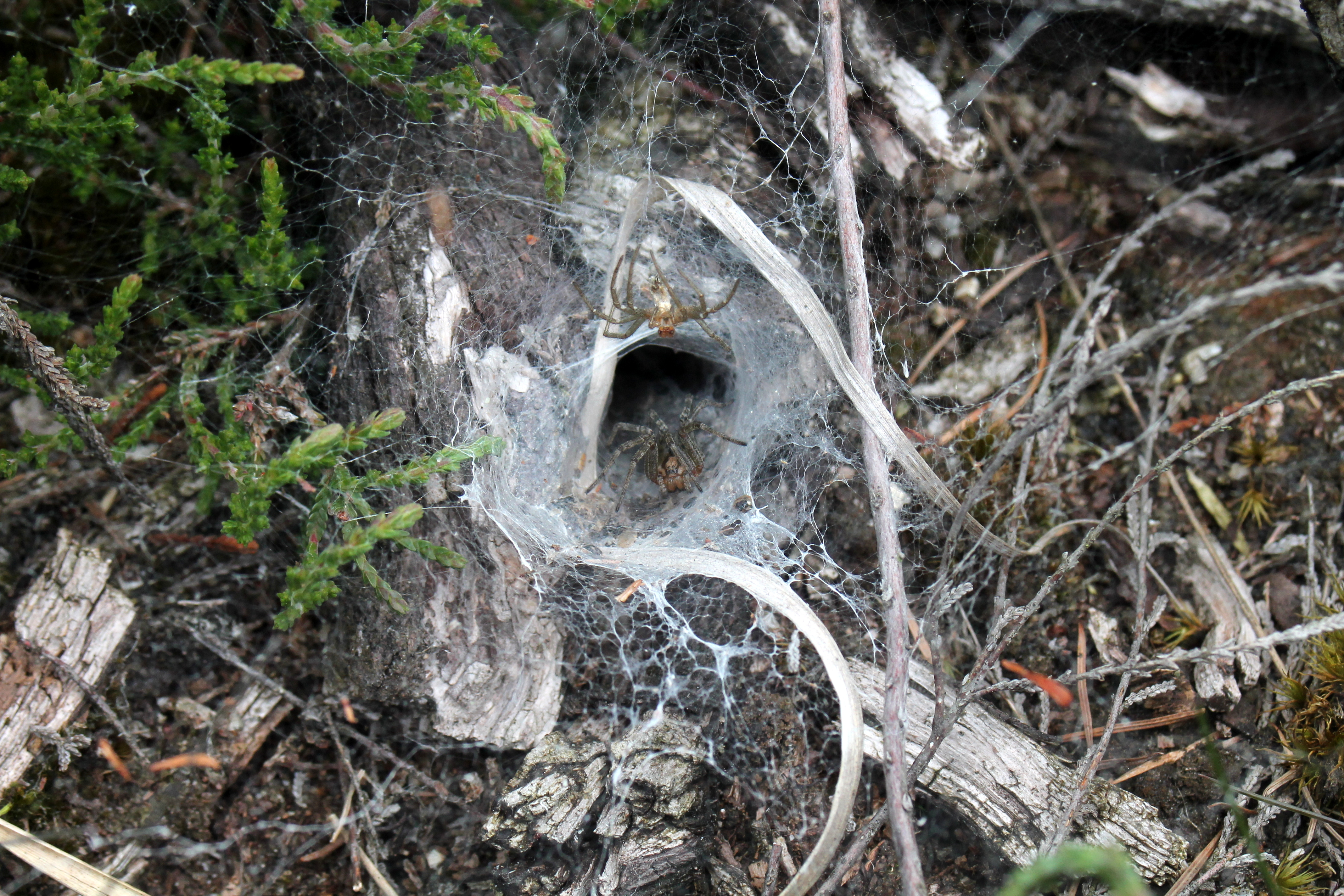 gefotografeerd in de Planken Wambuis, De Veluwe, Nederland